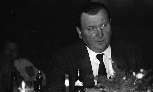 Kurt Vajen bei einer Diskussionsrunde, ca. 1989